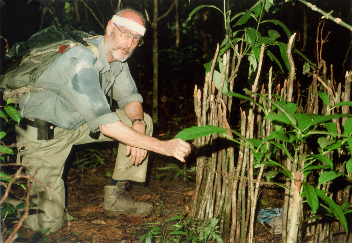 Prof. Eberhard Curio neben einer Falle für Warane